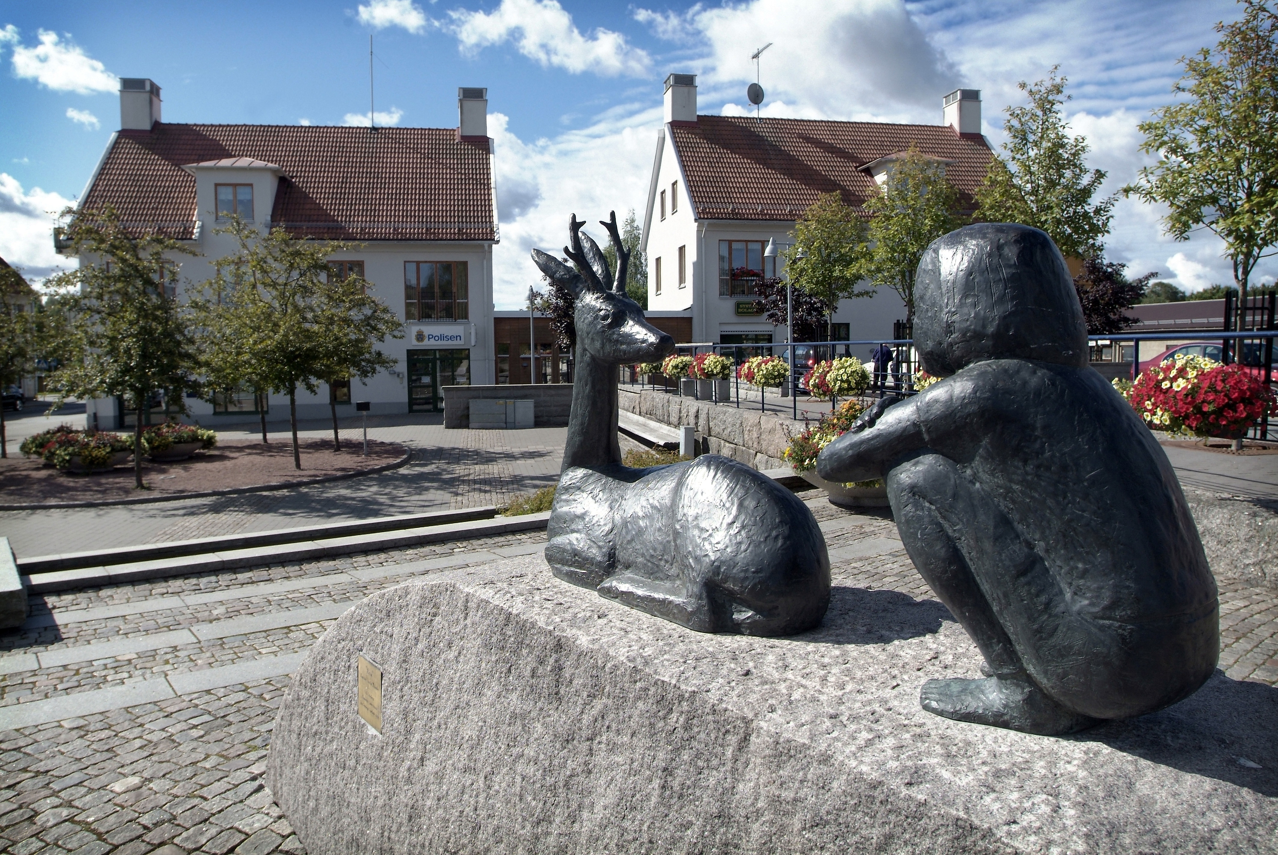 Torget i stad Fjugesta